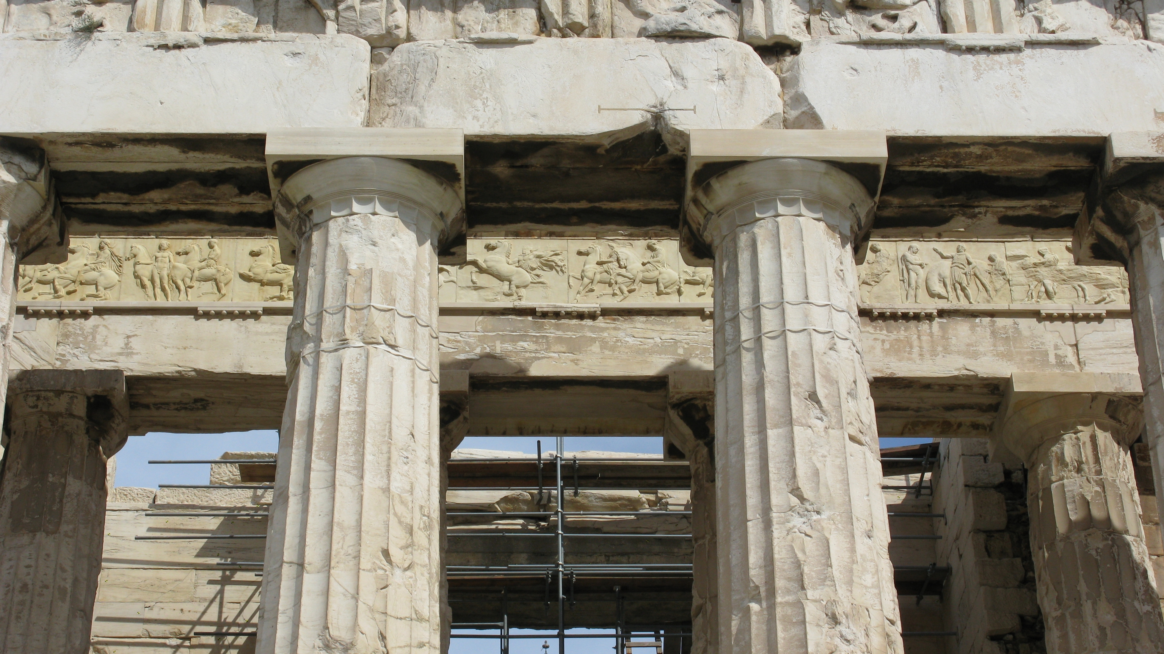 Acropolis of Athens, Greece. --- Παρθενώνας. Ακρόπολη, Αθήνα.